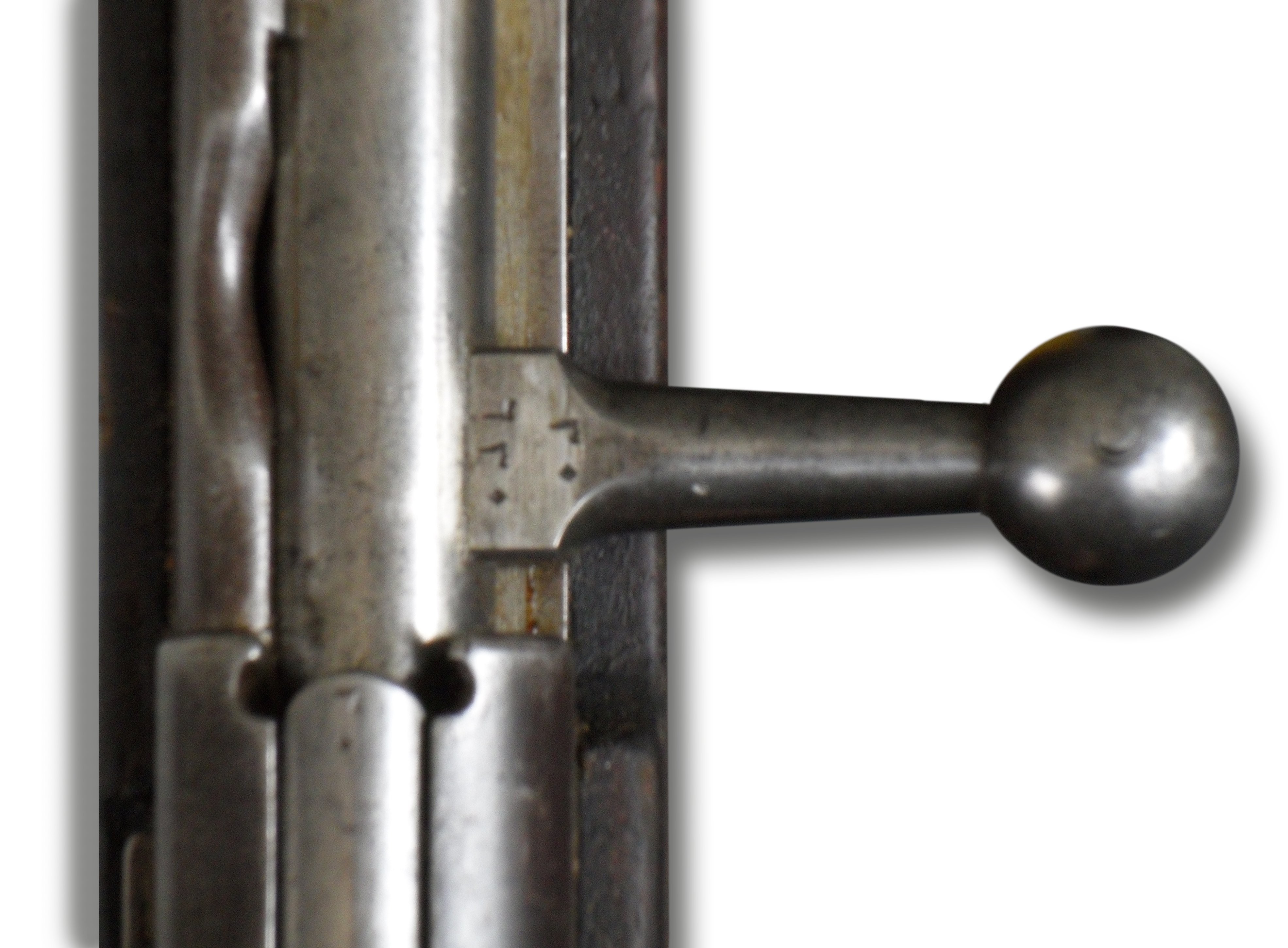 Kammerstängel des Gewehr88 mit eingeschlagenem Halbmond